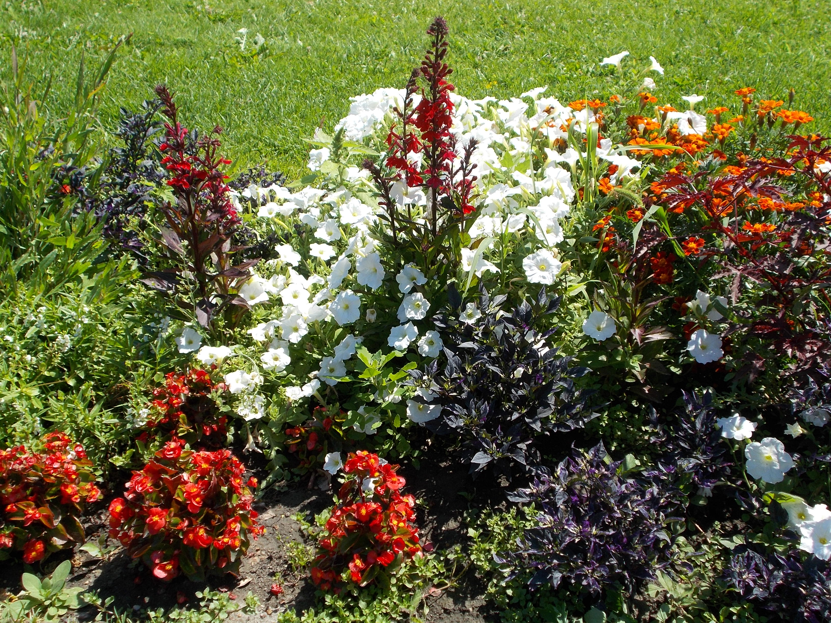 Vegyes. Főleg fehér. - Rózsa kert, Magyarország, Budapest, Margitsziget